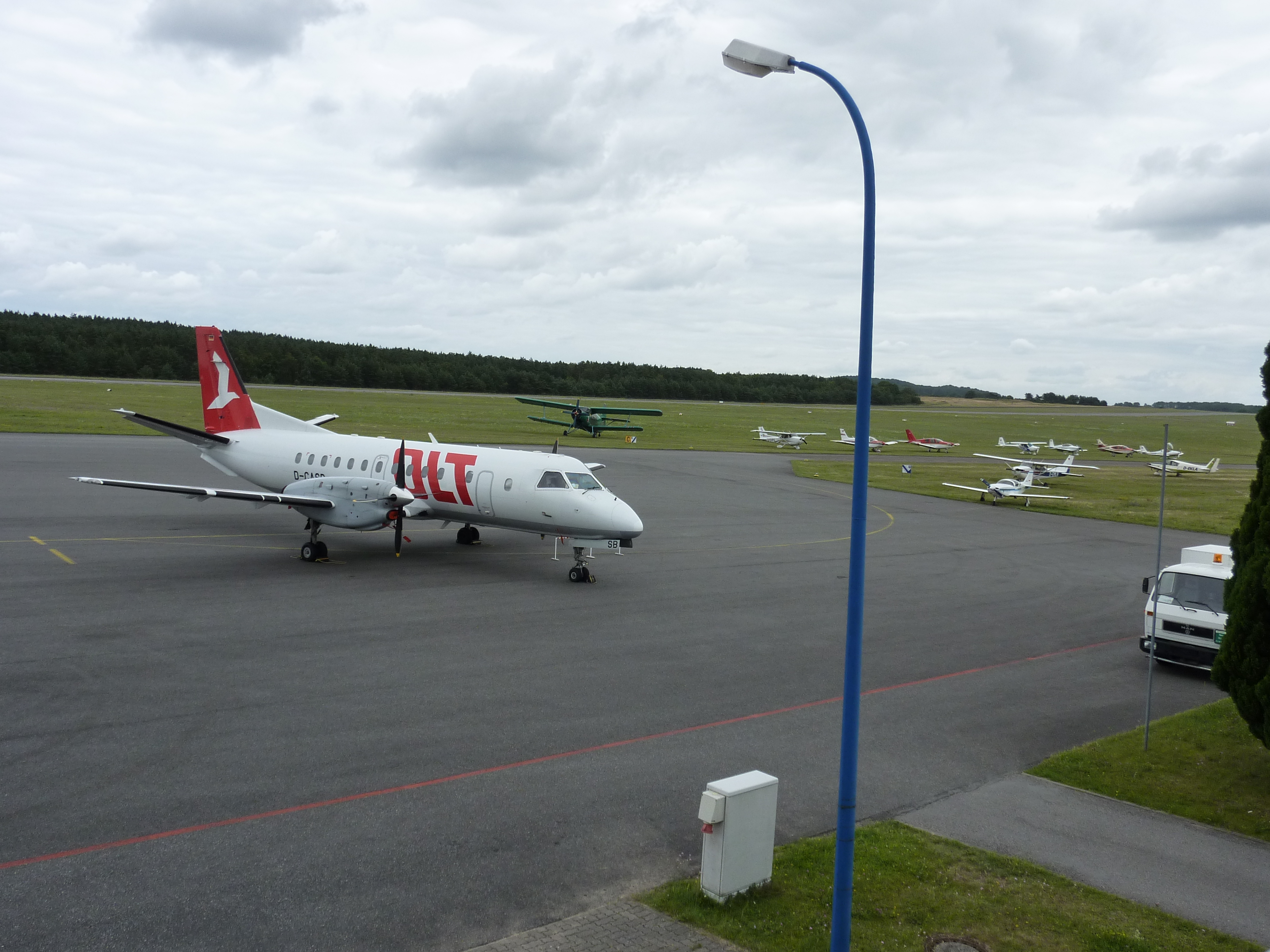 Flugzeug D-CASB der OLT am Flughafen Heringsdorf